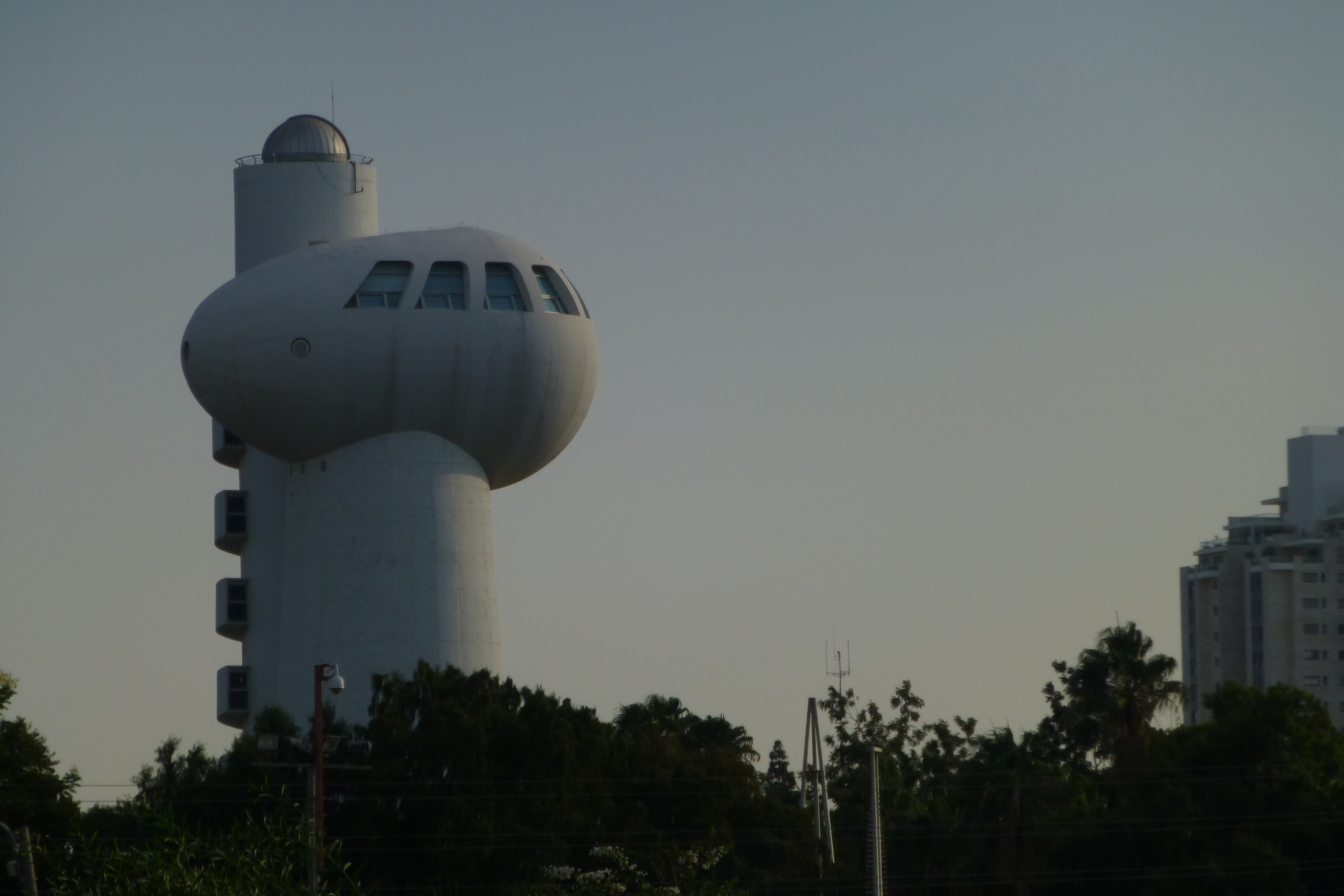 מכון ויצמן למדע הוא מכון מחקר העוסק בתחומי מדעי הטבע והמתמטיקה שנמצא ברחובות שבישראל. כמו כן, המכון משמש כמוסד אוניברסיטאי, "מדרשת פיינברג", המקבל תלמידים ללימודים אקדמיים לתואר שני ושלישי (דוקטור).